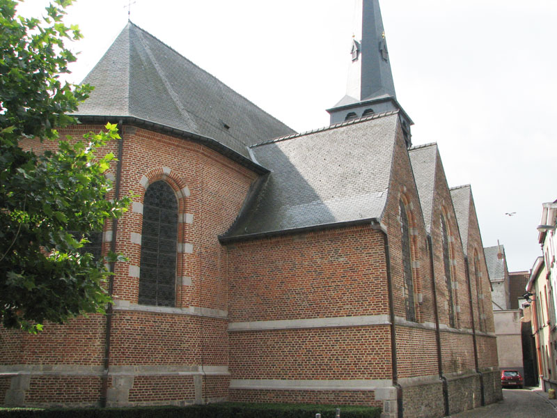 Eglise Saint Martin d'Ath Photo personnelle faite le 22 aoÃ»t 2006 Libre de droits